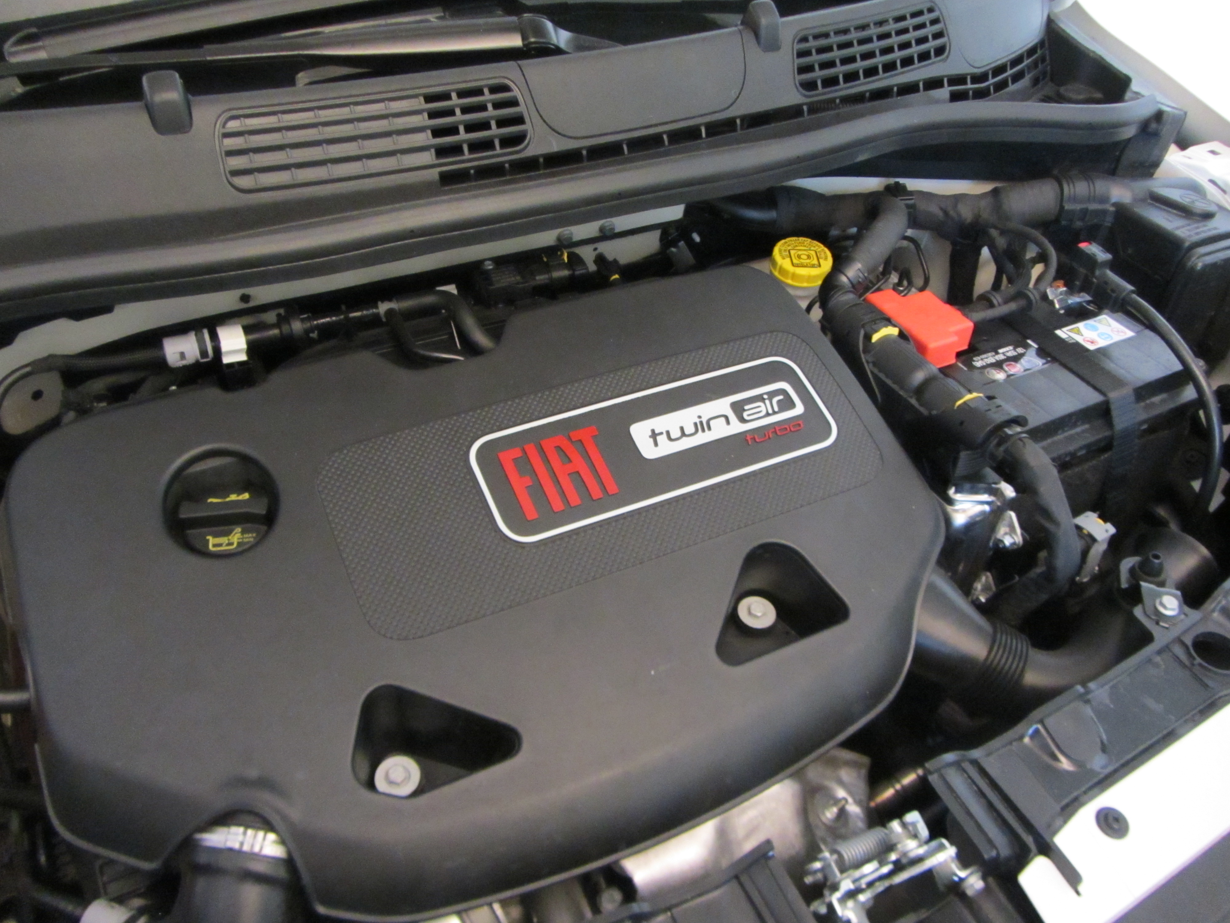 Il motore bicilindro Twin Air (SGE di FPT) al Motorshow di Bologna 2012